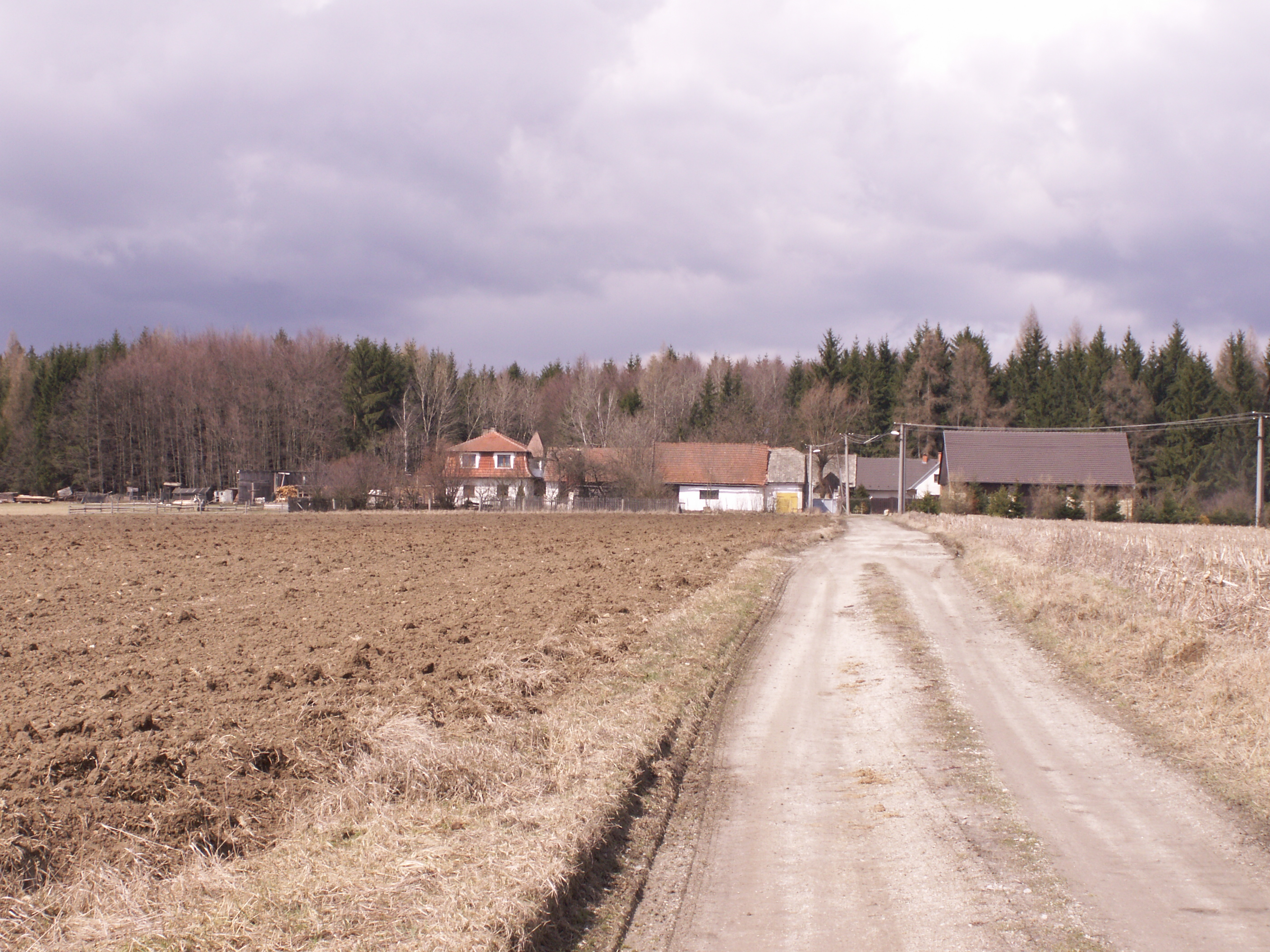 osada Horní Hlíny (obec Horní Libochová), okres Žďár nad Sázavou